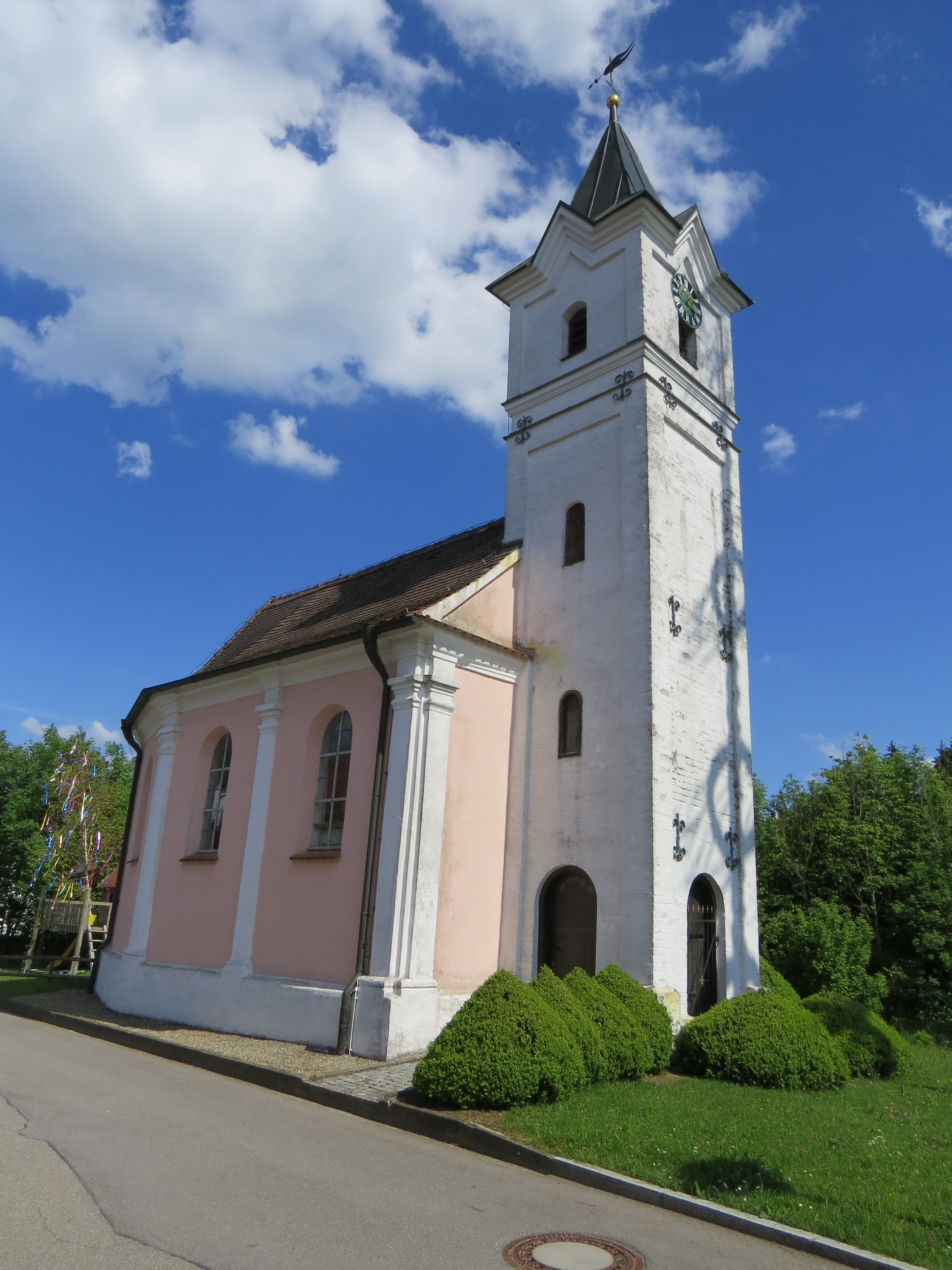 Kirche in Unterschönegg, Babenhausen (Schwaben)